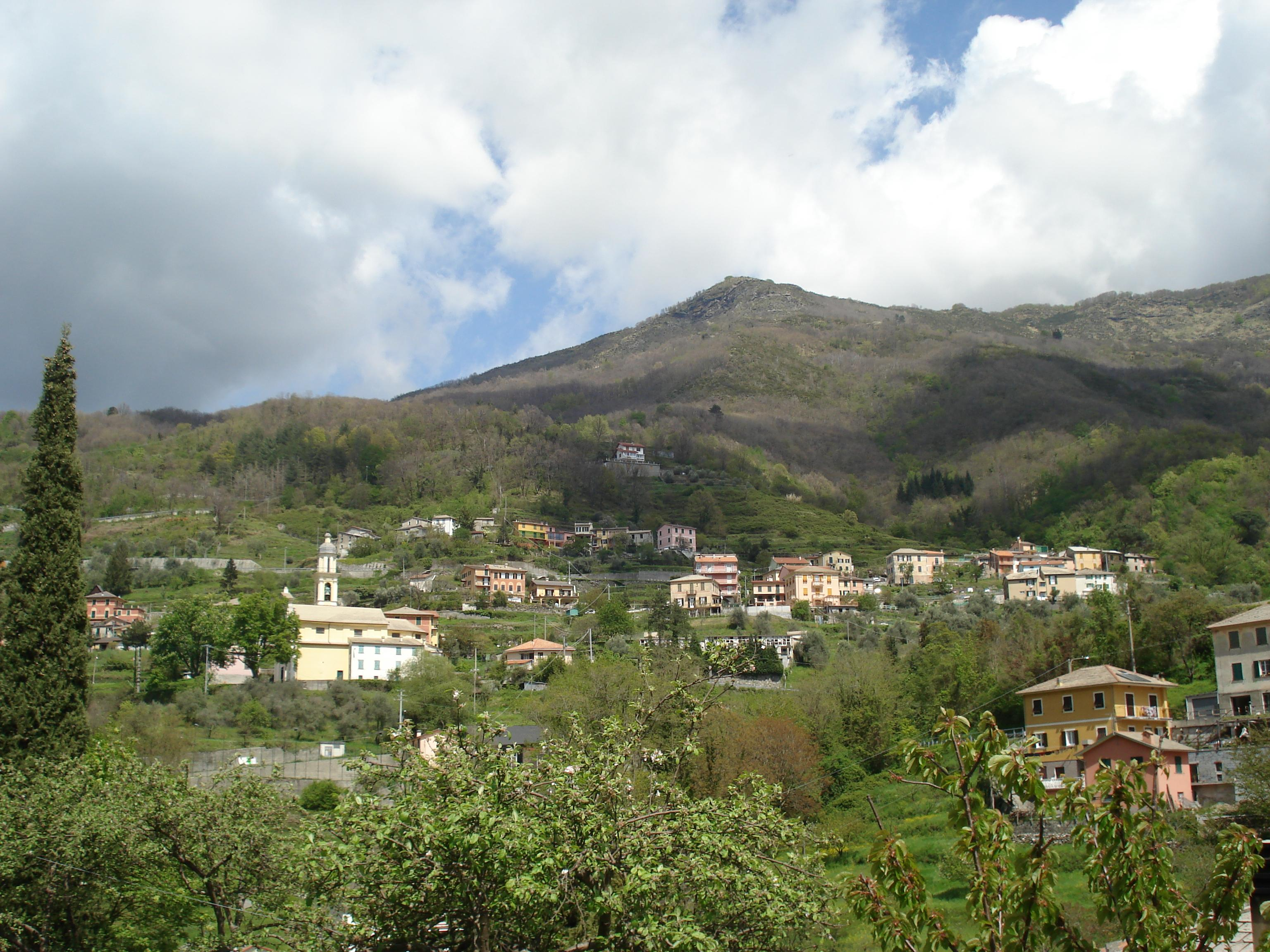 Cosmin latan , 01-05-2008 , Neirone